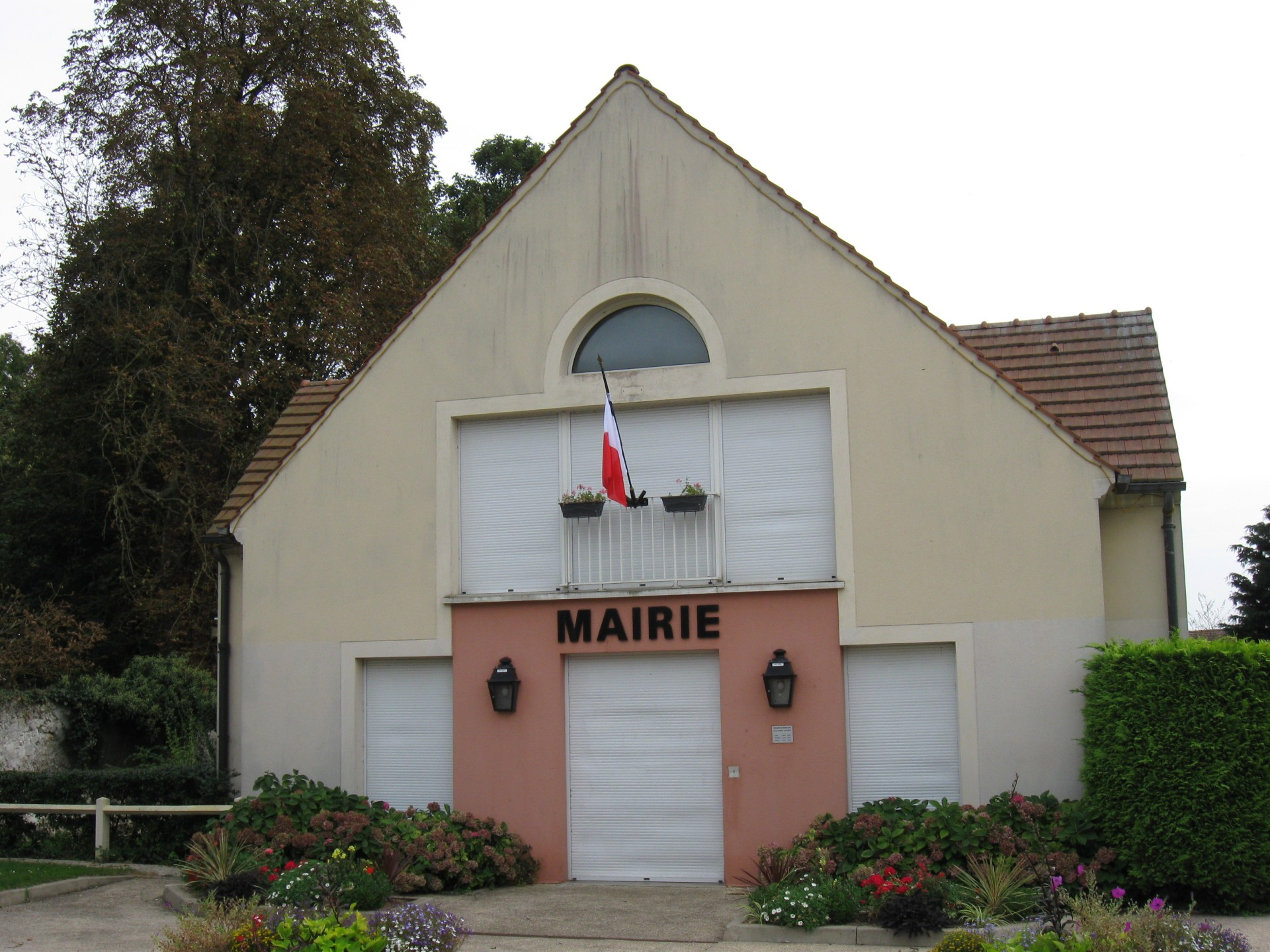 Mairie d'Iverny (Seine-et-Marne, région Île-de-France).